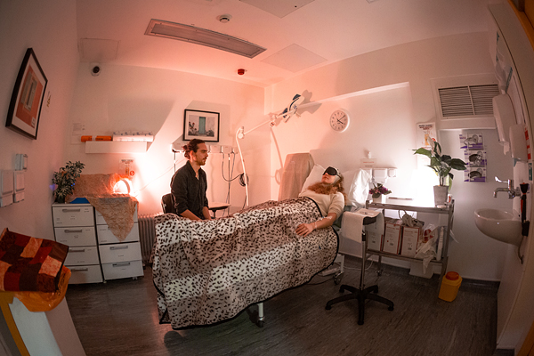 Recreación de una escena en donde los investigadores Chris Timmerman y Laura Kaertner representan el cuidado de viaje durante un ensayo clínico, Centro Imperial para la Investigación Psicodélica. Fotografía por Thomas Angus, Imperial College London.